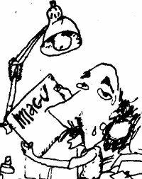 Bulmaro Castellanos Loza (Magú).